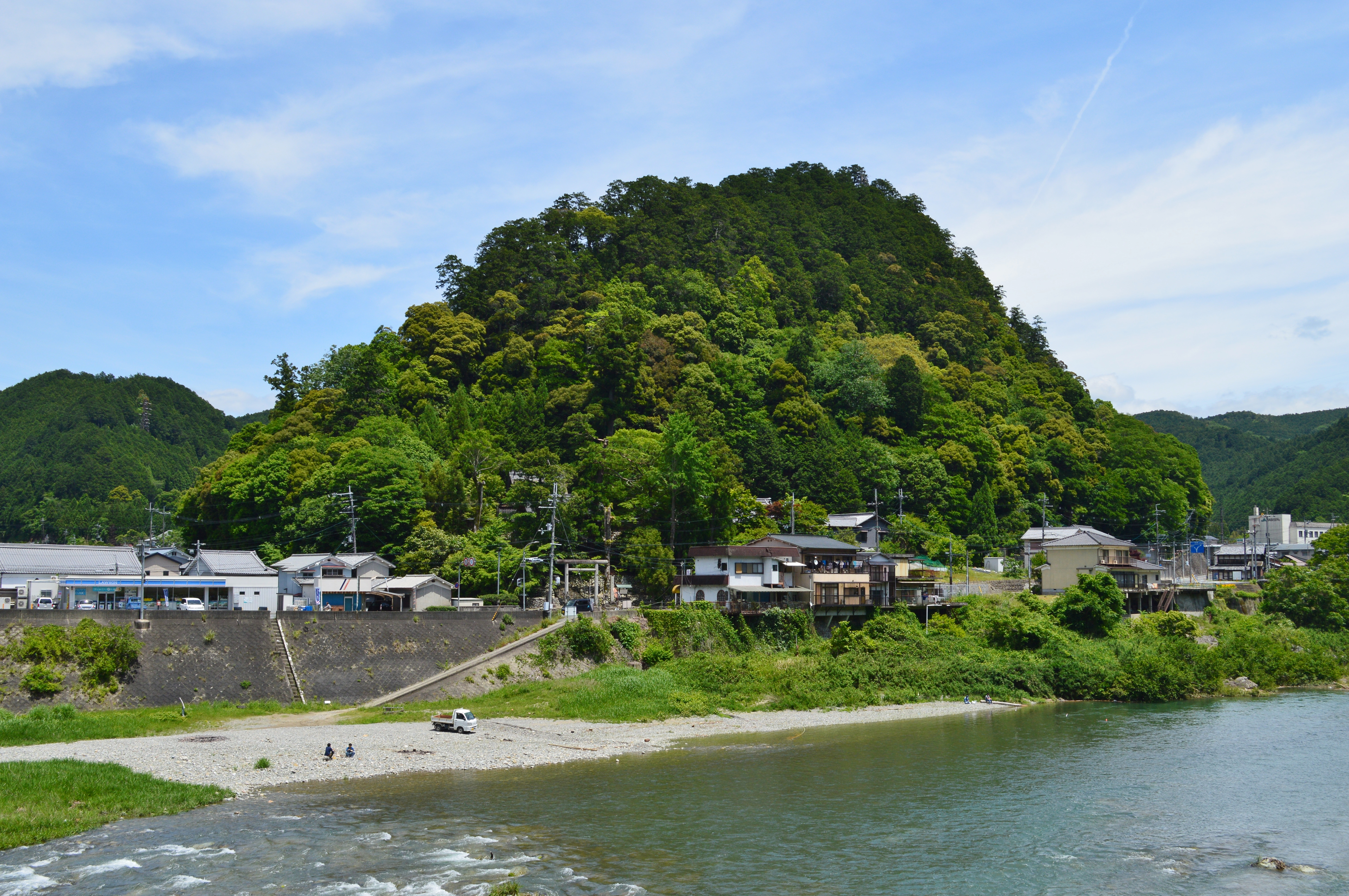 妹山 (吉野町) 遠景